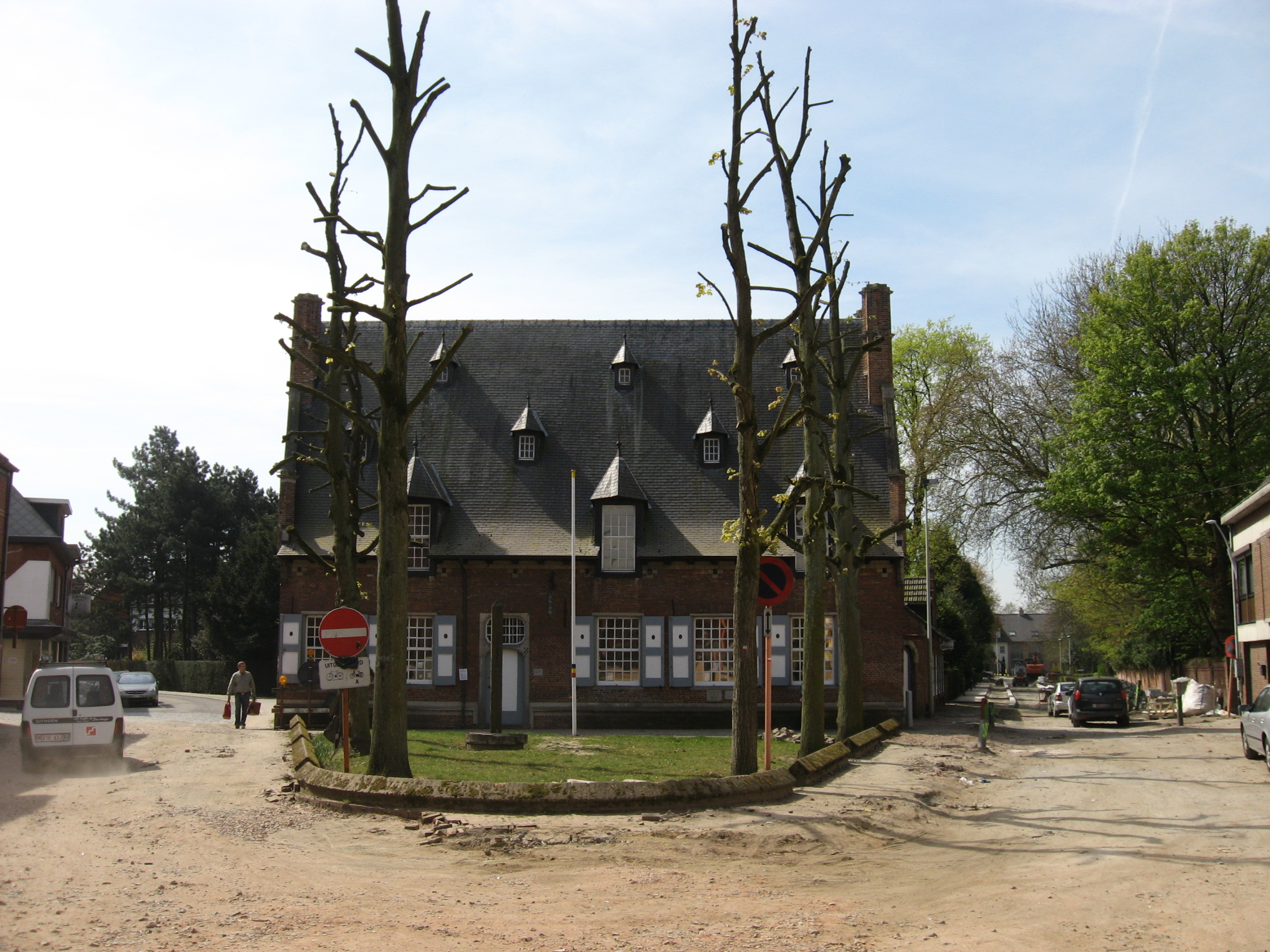 Schepenhuis in Brecht